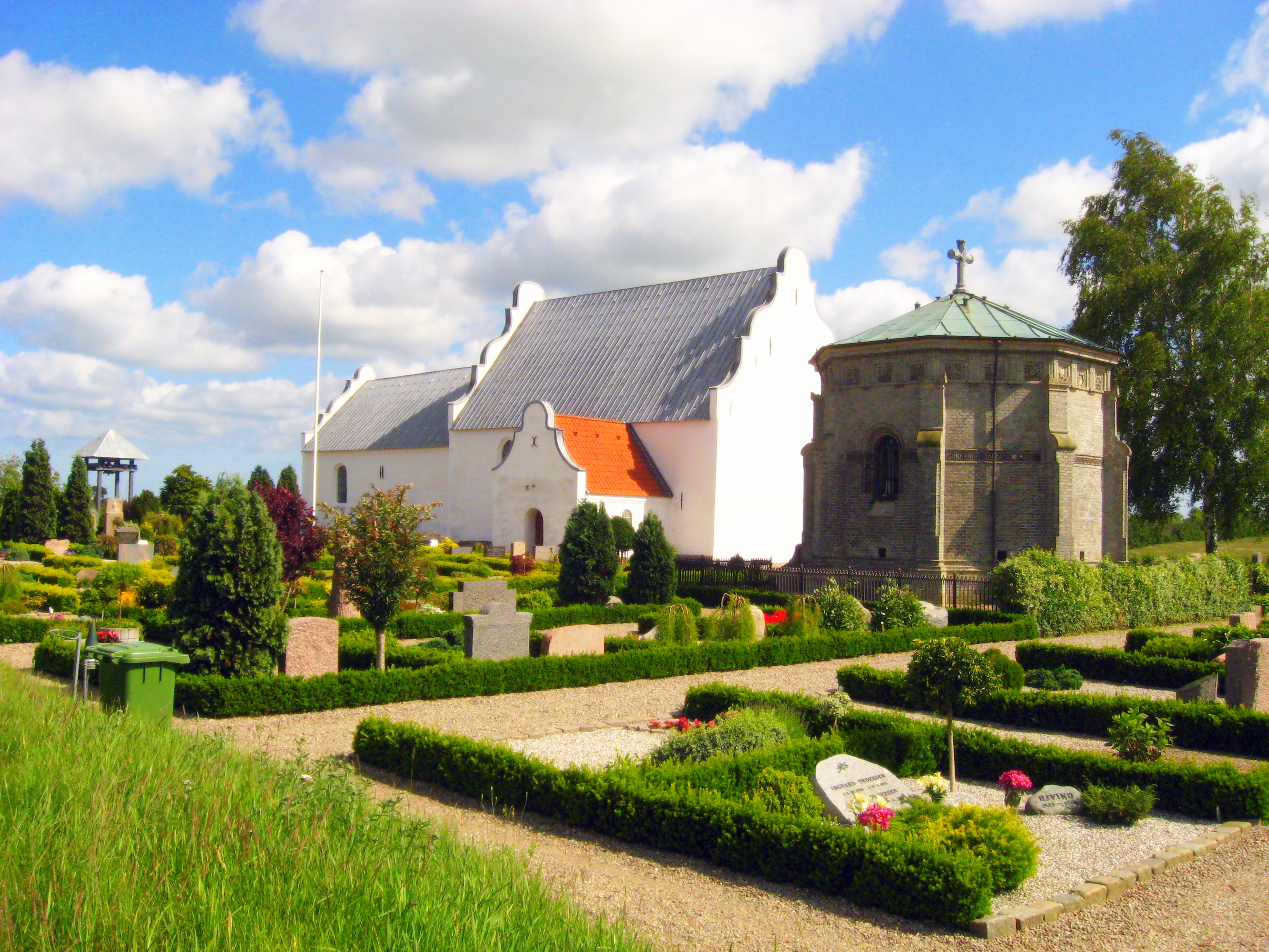 Volstrup Kirke, Frederikshavn Kommune